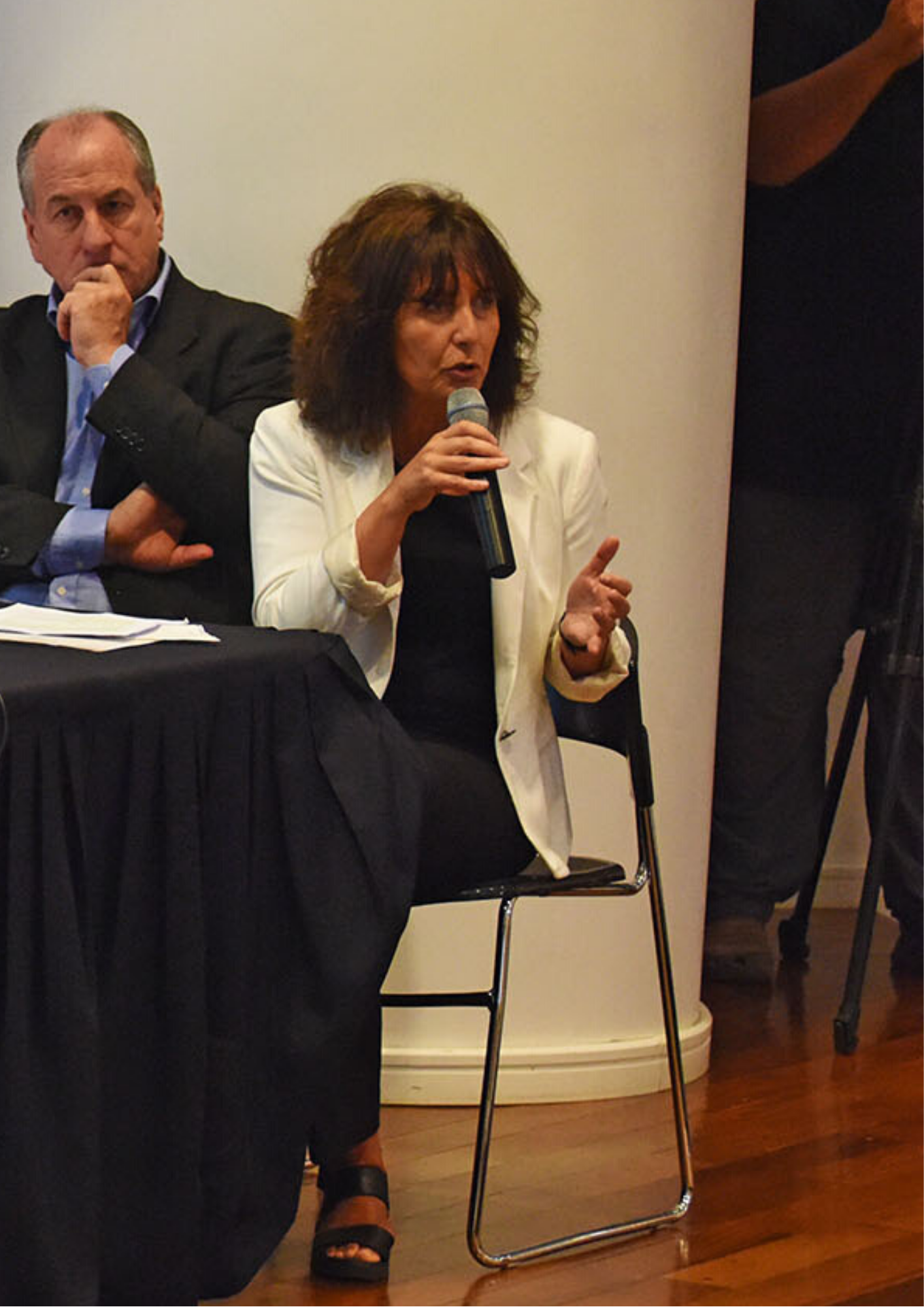 La directora de Inmujeres Mariella Mazzotti en el evento "Más igualdad, compromiso de Estado" el 6 de marzo de 2017 en Montevideo, Uruguay